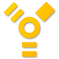 Logo Firewire